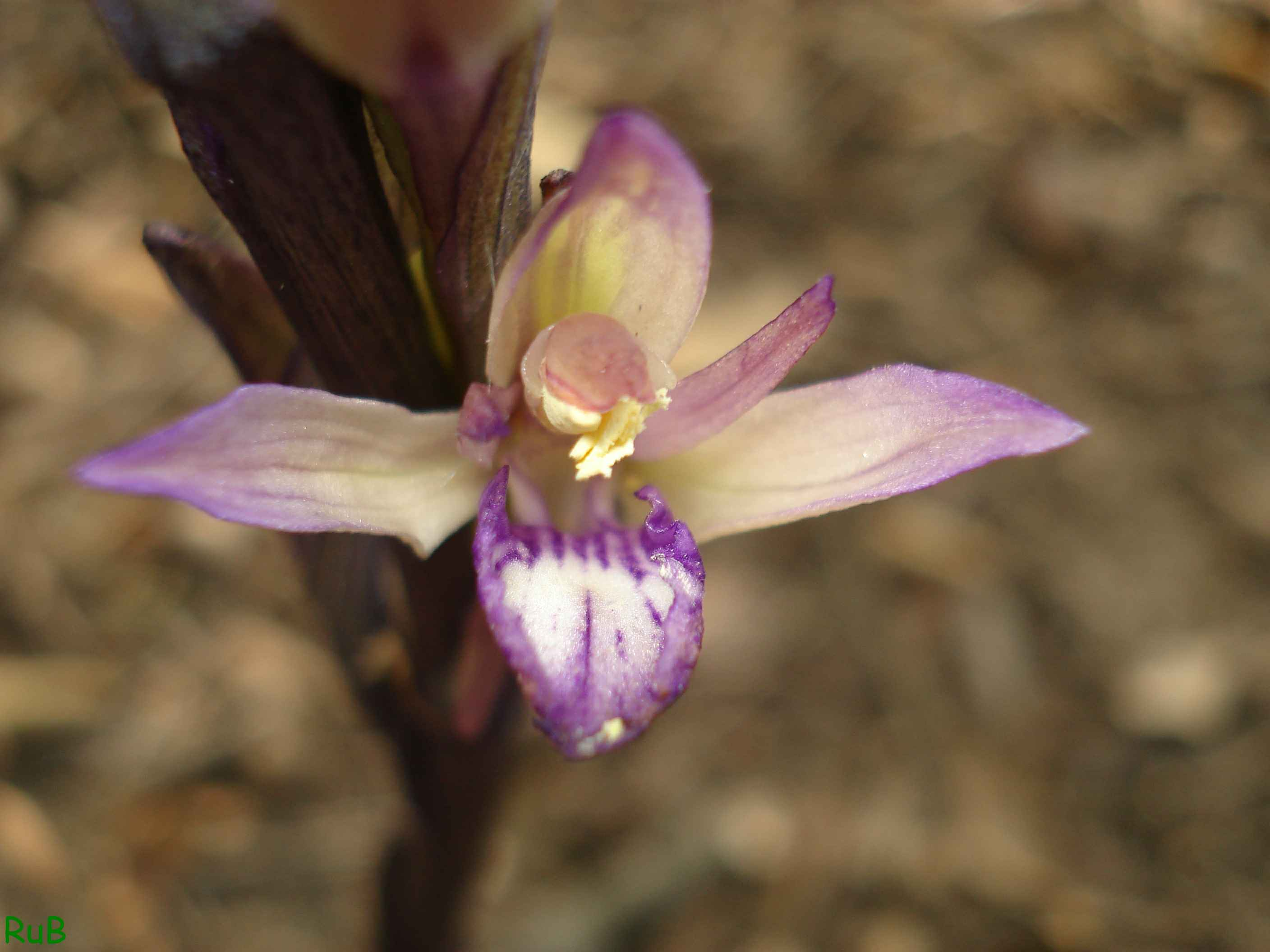 Limodorum abortivum, Orchidée - Limodore à feuilles avortées : Fleur